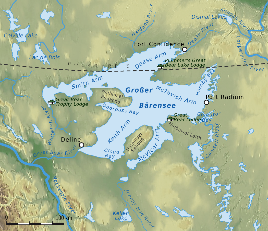 Übersichtskarte Großer Bärensee.